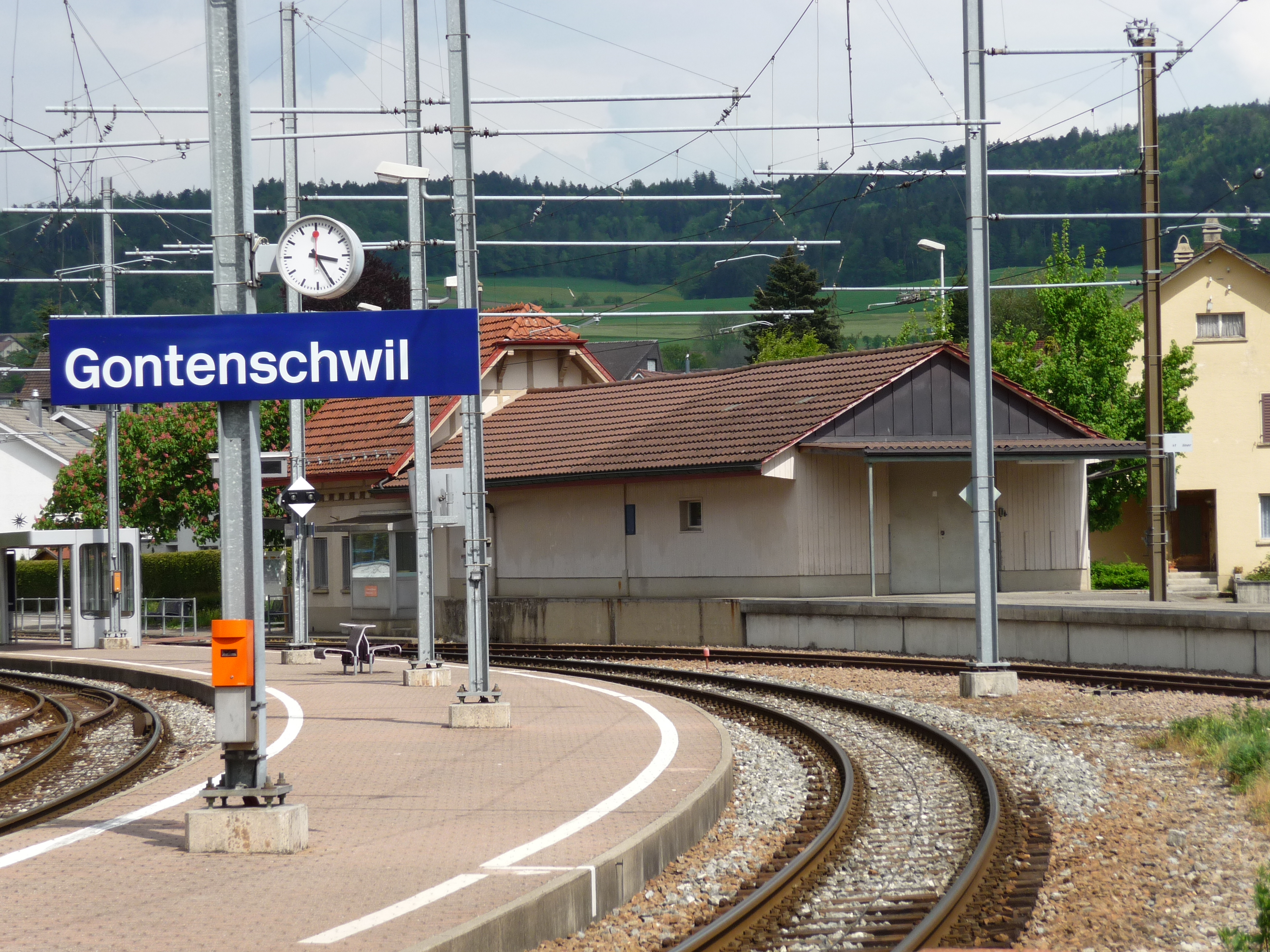 Bahnhof in Gontenschwil